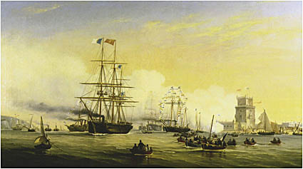 Chegada a Lisboa da Rainha Dona Estefânia a bordo da corveta "Bartolomeu Dias"